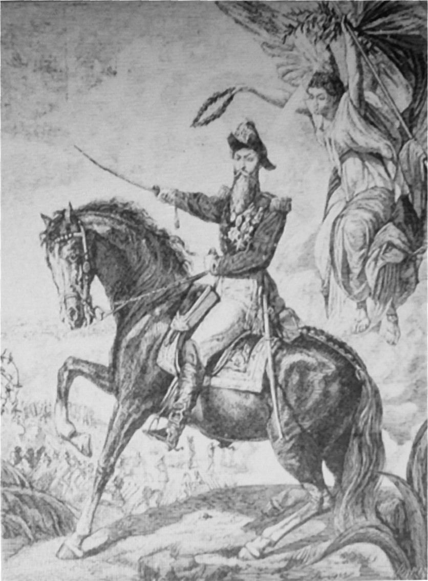 Cuadro alegórico de la Batalla de Apure, 1872, en el que destaca la figura ecuestre de Guzmán Blanco (original al óleo, en paradero desconocido. Litografía de H. Meyer)